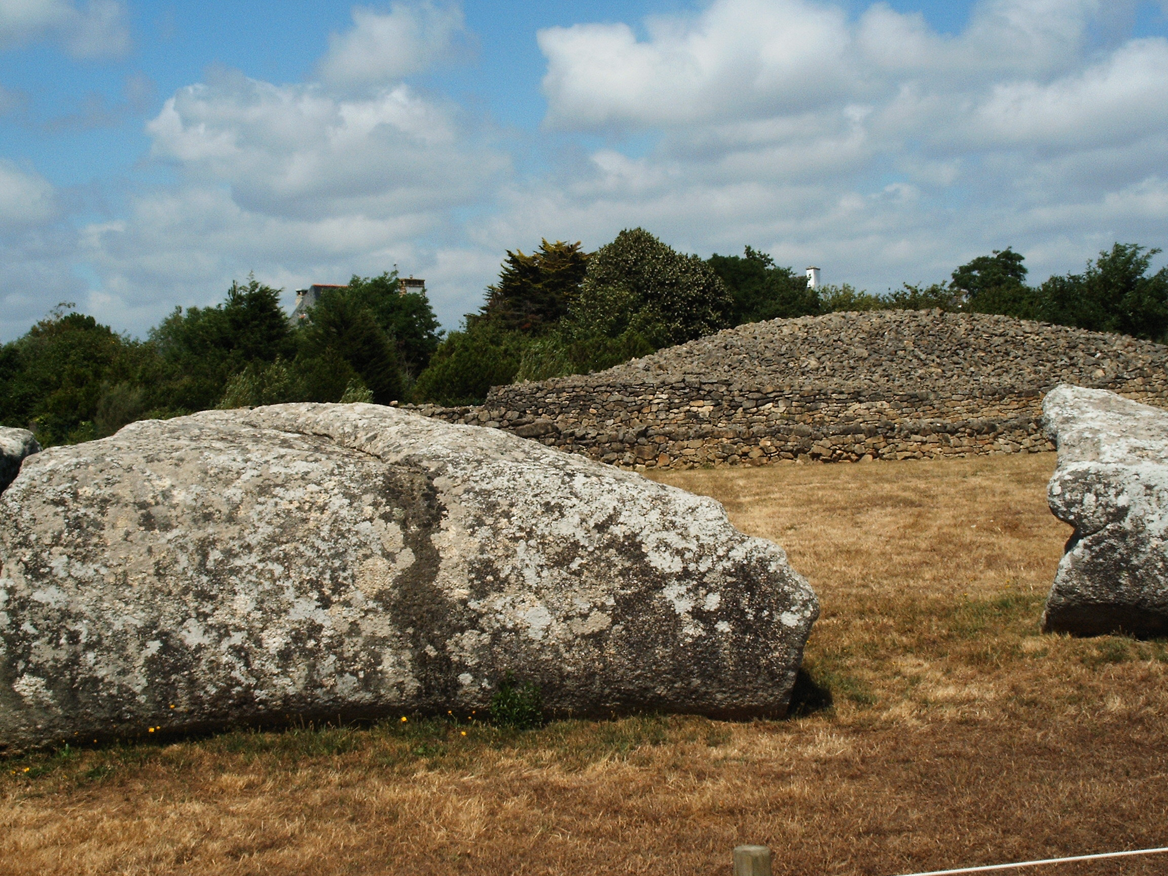 Locmariaquer - Großer Menhir und der rekonstruierte Hügel des Table des Marchand